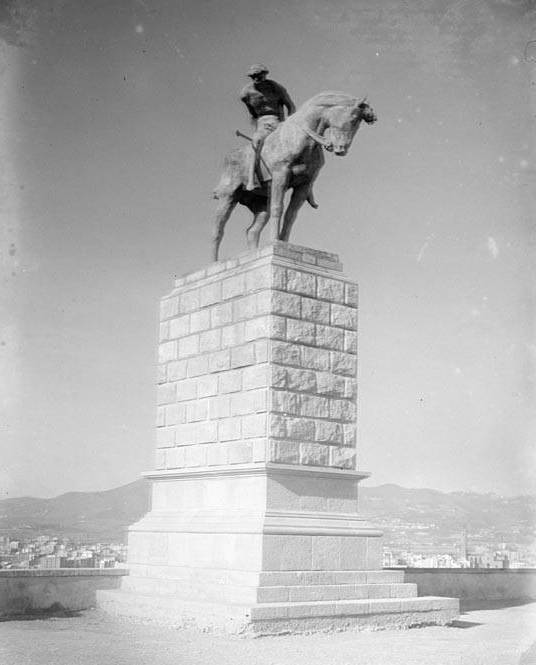 Estàtua eqüestre de Sant Jordi a Montjuïc. Enric Ribas i Virgili (Entre 1924 -que és la data de l'escultura- i 1930)